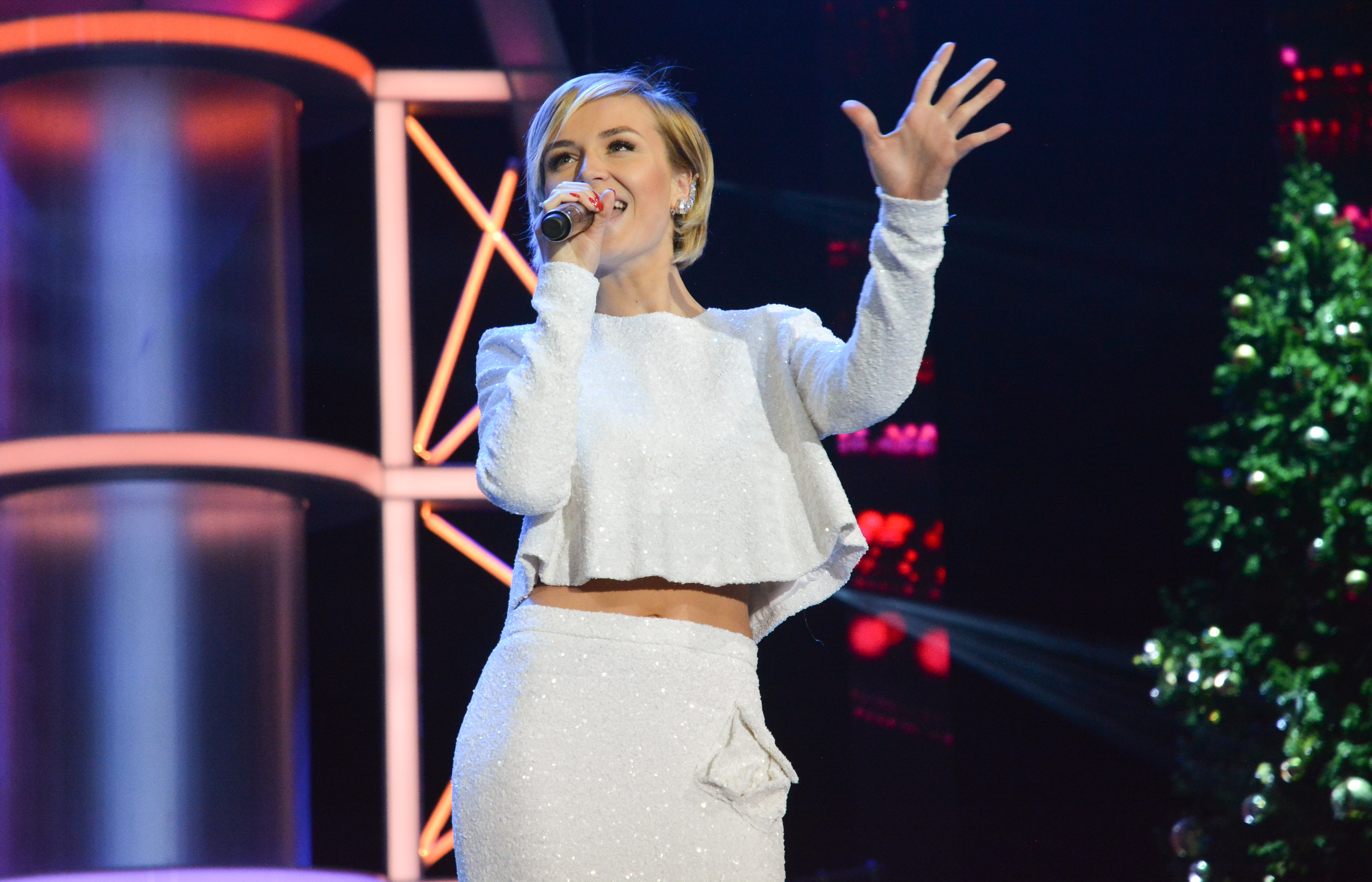 Полина Гагарина на Рождественской Песенке года 2015